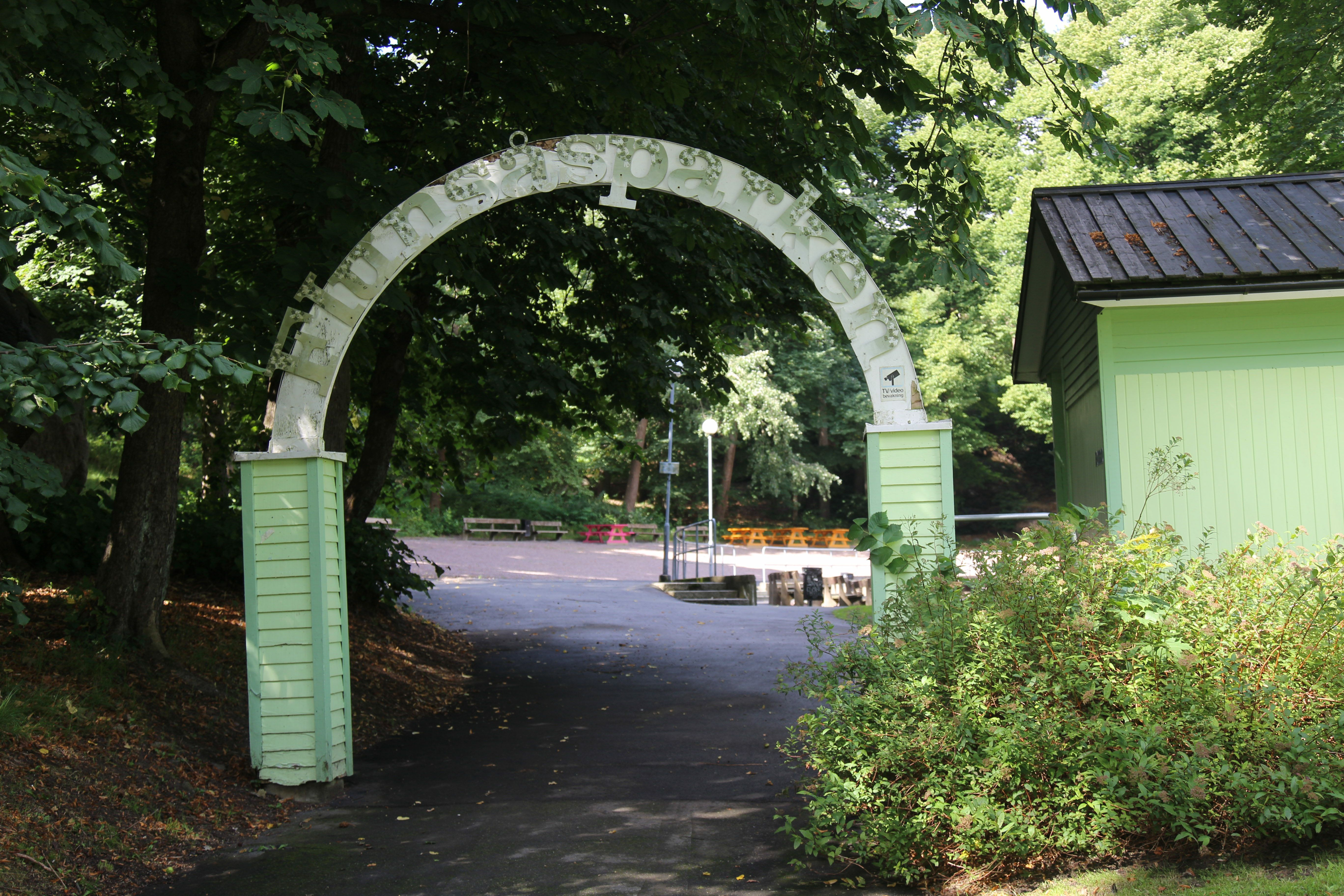 Entren tillFlunsåsparken i Göteborg.